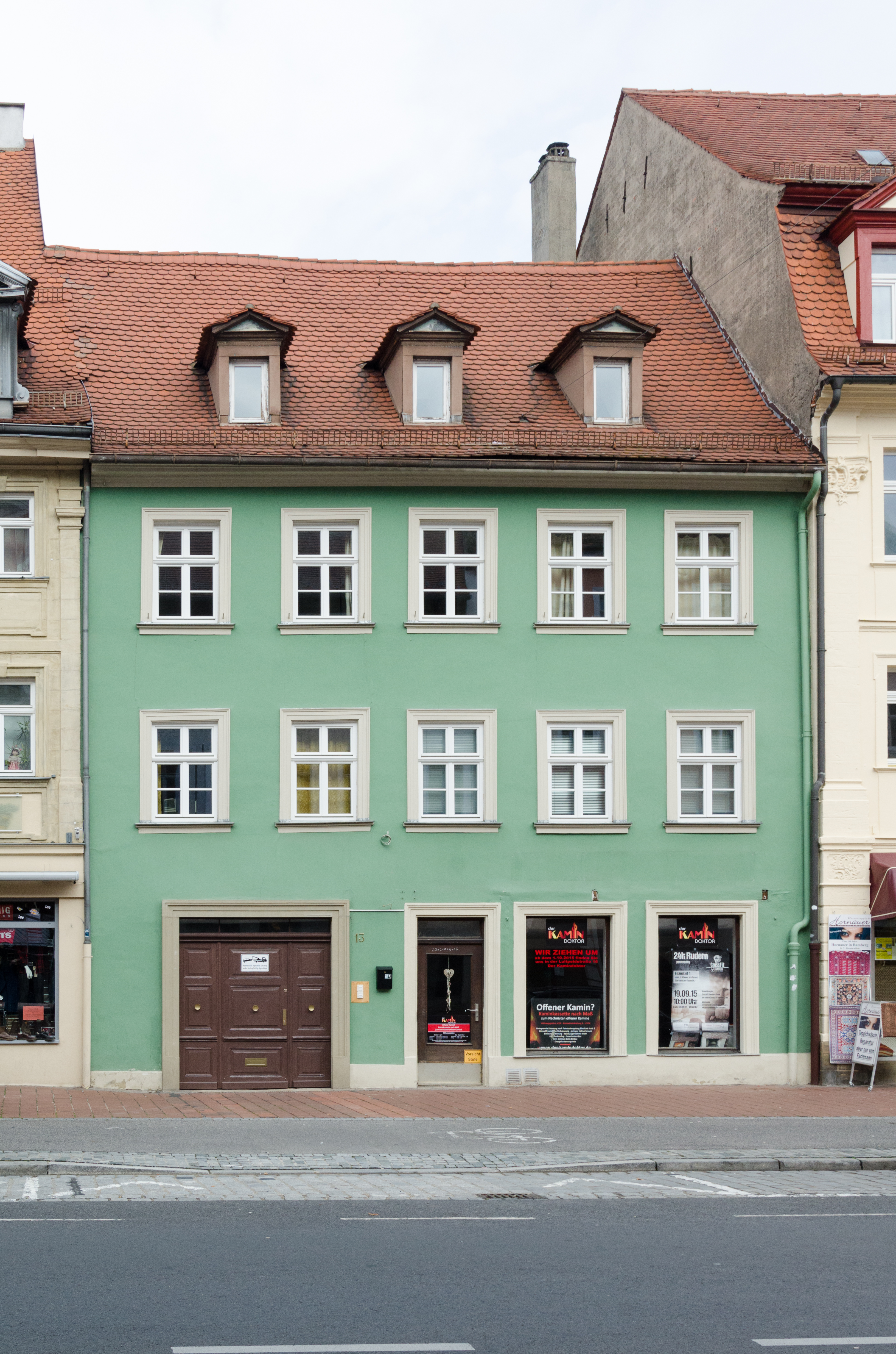 Bamberg, Obere Königstraße 13